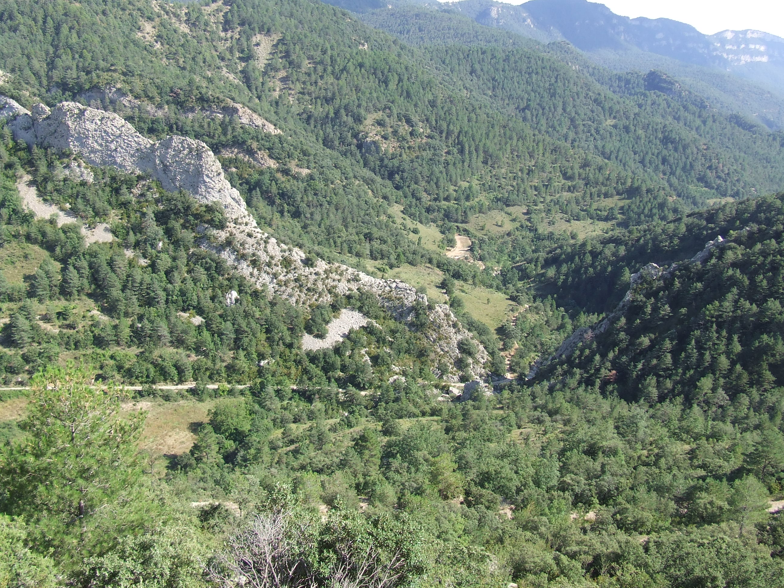 Naixement del riu Rialb, sota el poble de Bóixols.